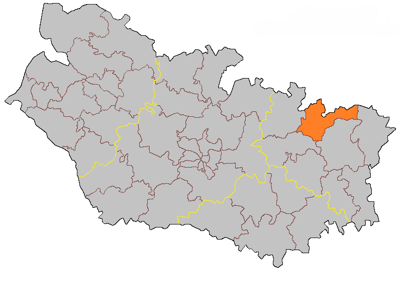 Кантон Комбль на карте департамента Сомма